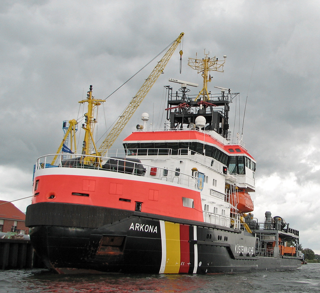 Beschreibung: Mehrzweckschiff Arkona auf der Hanse Sail 2005 Typ: Schadstoffunfall-Bekämpfungsschiff Bauwerft: Peene-Werft GmbH, Wolgast Länge / Breite / Tiefgang: 69,05 m / 14,85 m / 4,50 m max Antrieb: zwei 1850 kW POD-Systeme, dieselelektrisch Geschwindigkeit: 13 kn max Besatzung: 16 Personen Fotograf: Darkone, 13. August 2005